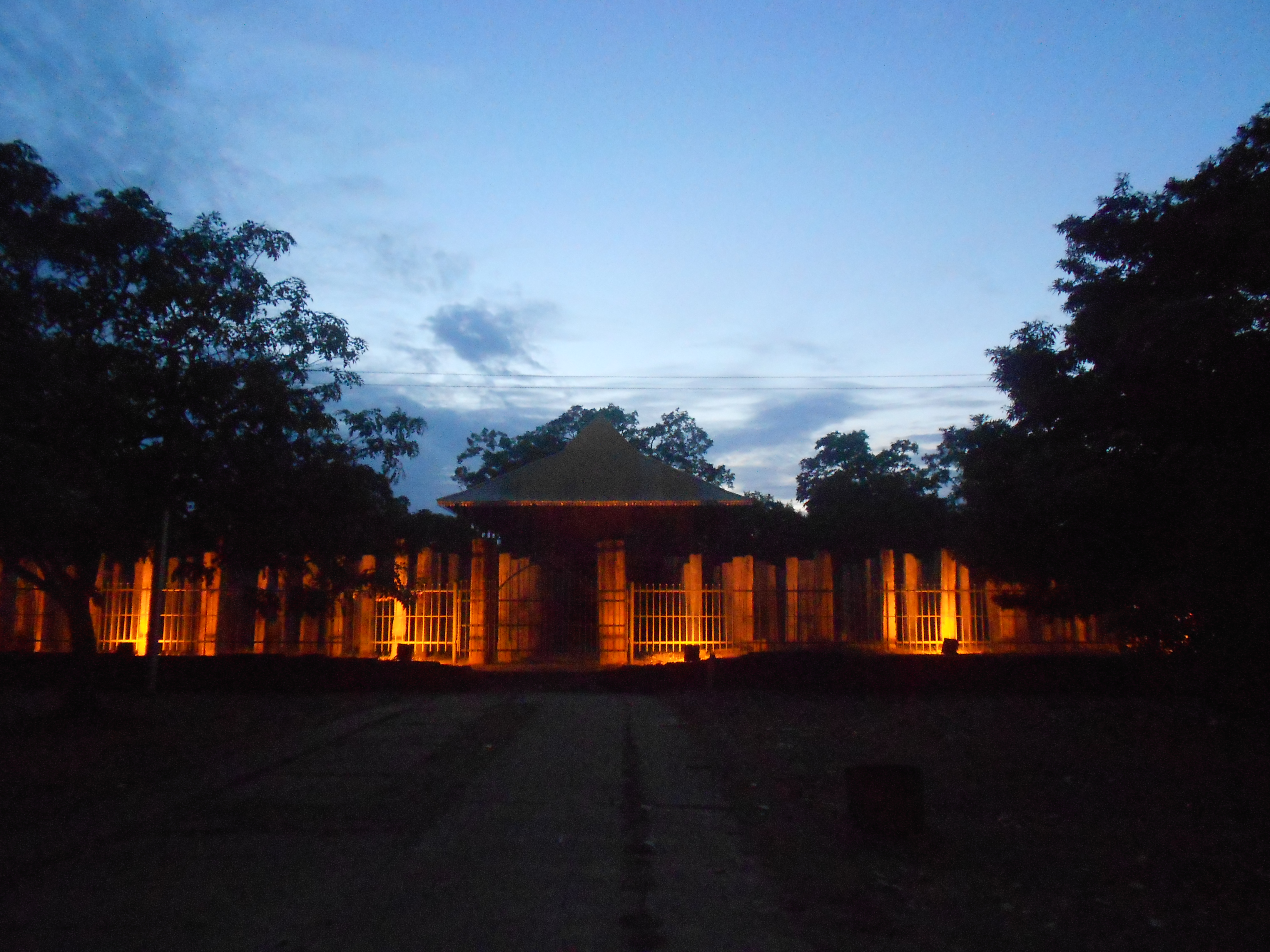 සිංහල: ලෝවාමහාපාය